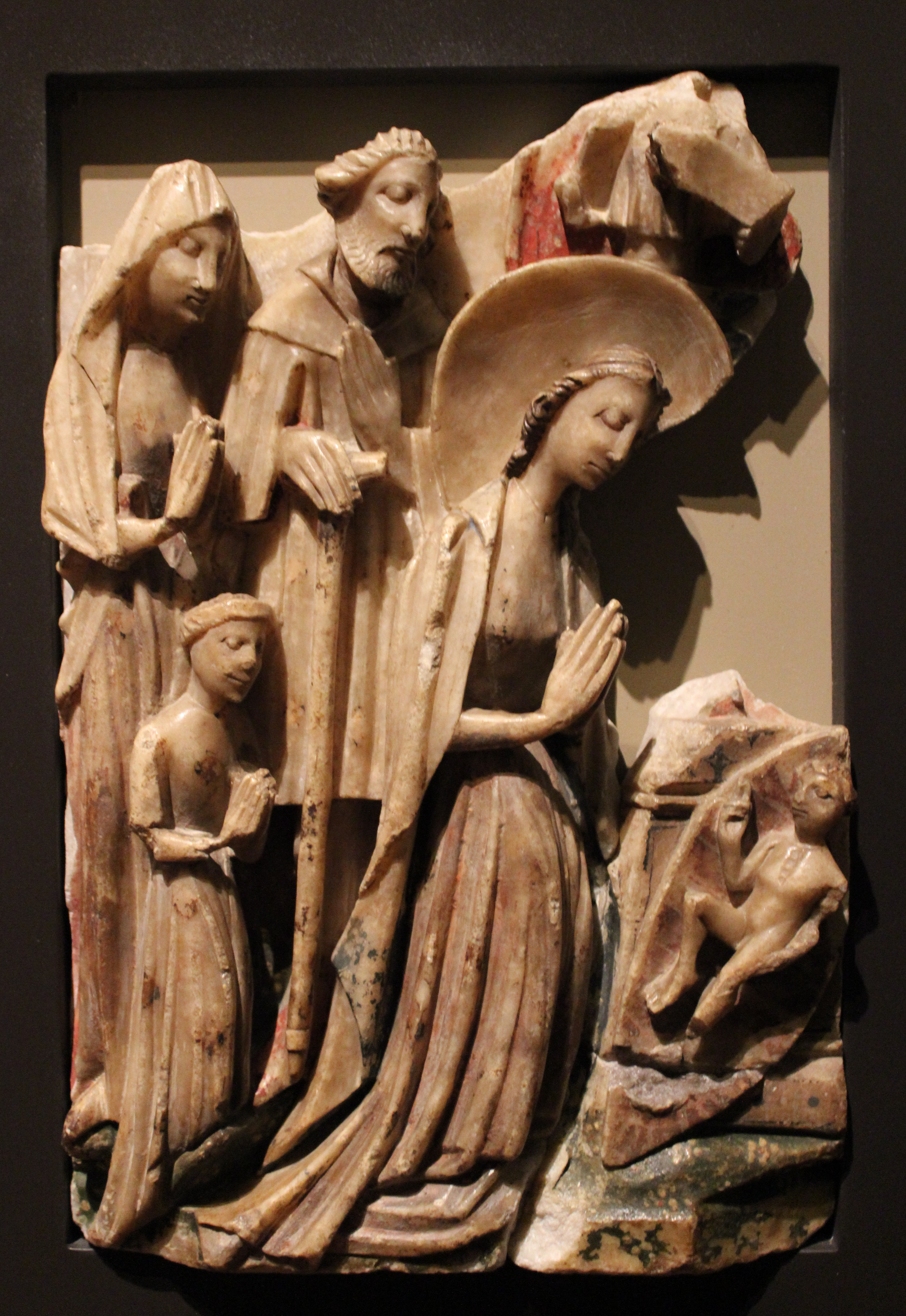 Madrid, M.A.N. Alabastro inglés con la Natividad, ss. XIV-XV.